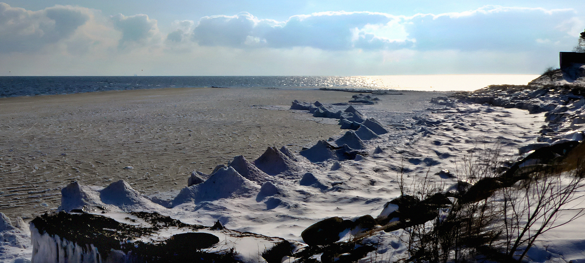 Isvulkaner vid Ystads Saltsjöbad 4 mars 2018.